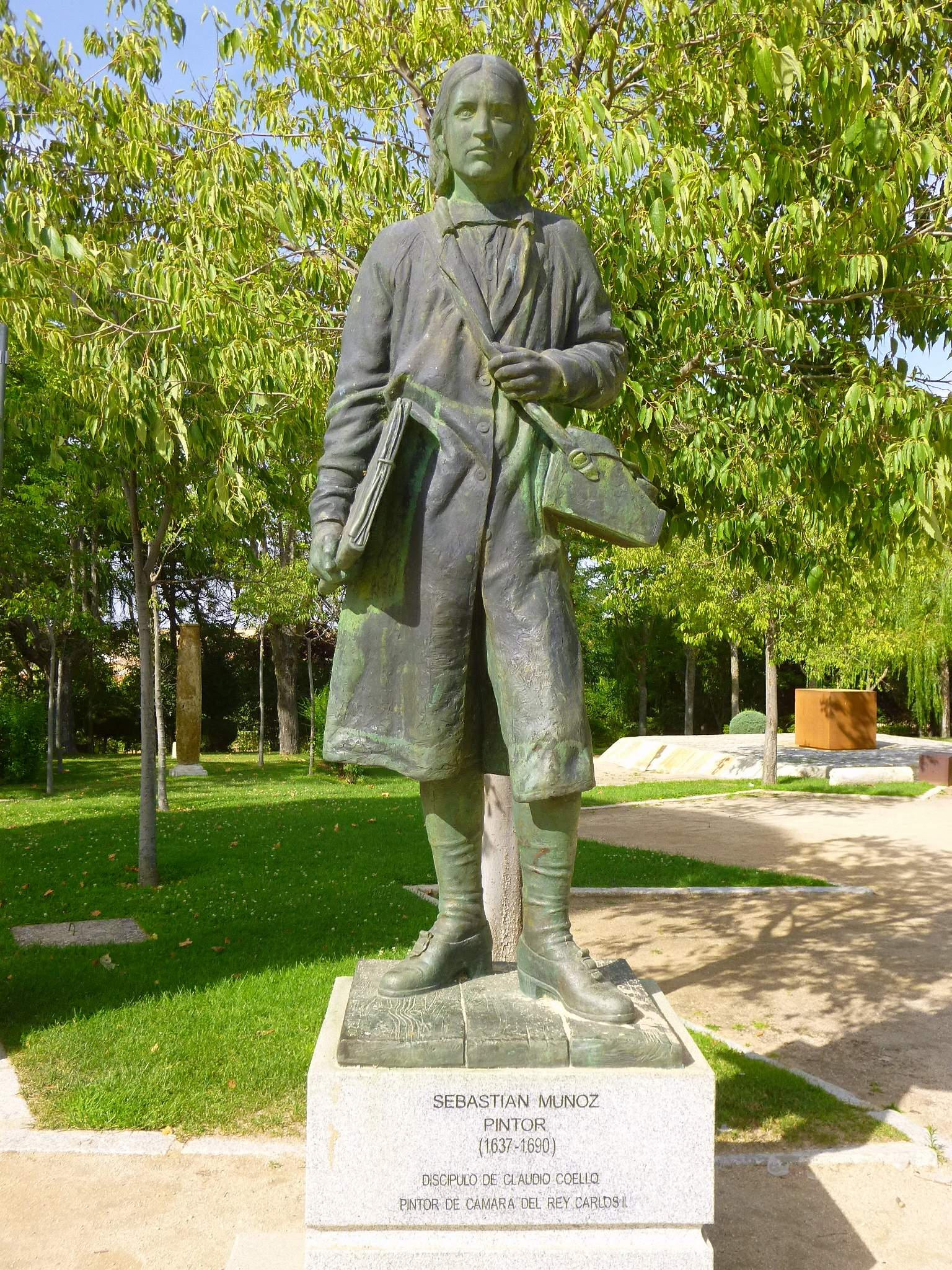 Parque Histórico de San Sebastián (Navalcarnero, Madrid)